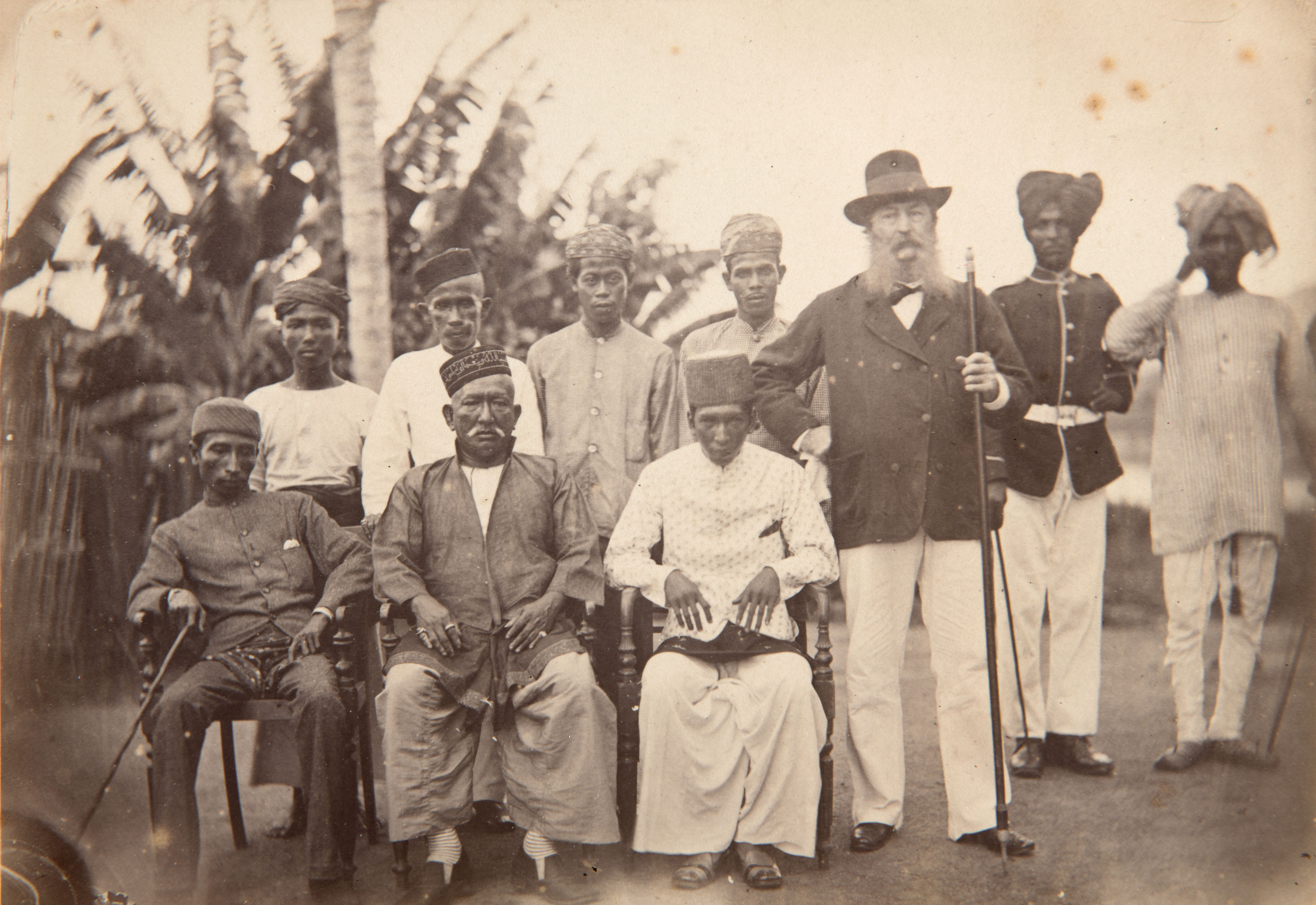 Foto: Groepsportret met Hugh Low, de Britse resident van Perak, en twee Maleisische raja's, lokale bestuurders in Perak en Larut